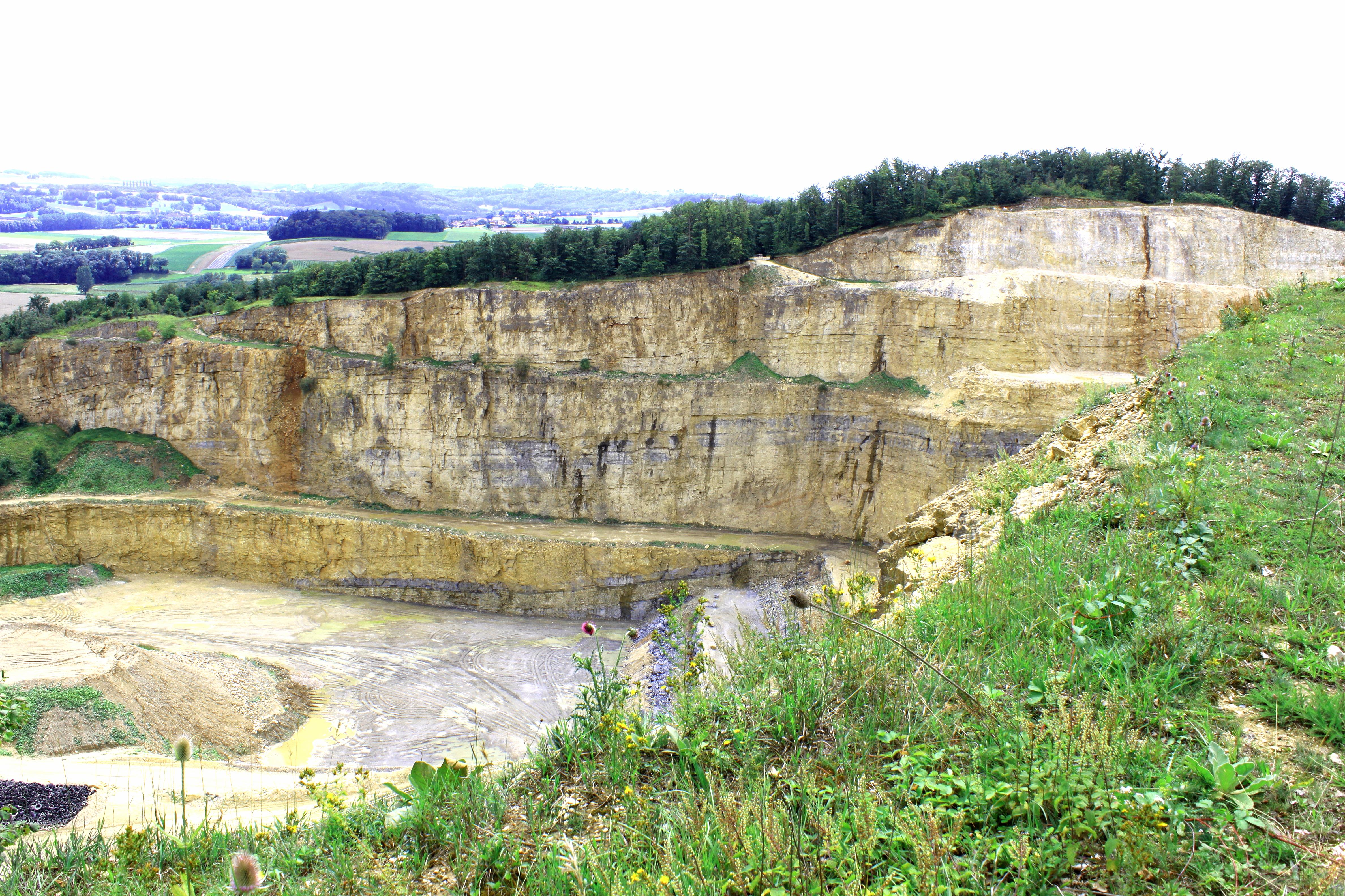 Suisse, canton de Vaud, Le Mormont, site Proto-historique et âge du Fer : vue depuis le haut Mormont sur la carrière en cours d'exploitation.